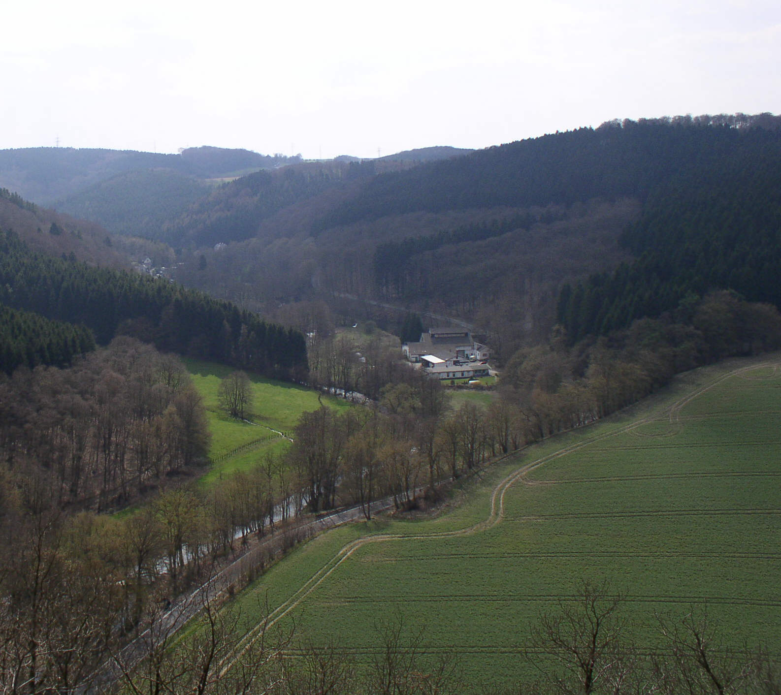 Blick vom Hohenstein nach Süden zum Alhauser Hammer (Bildmitte) an der Ennepe in Ennepetal; Fluss mit Aue im Naturschutzgebiet „Tal der Ennepe“ (NSG EN-028)